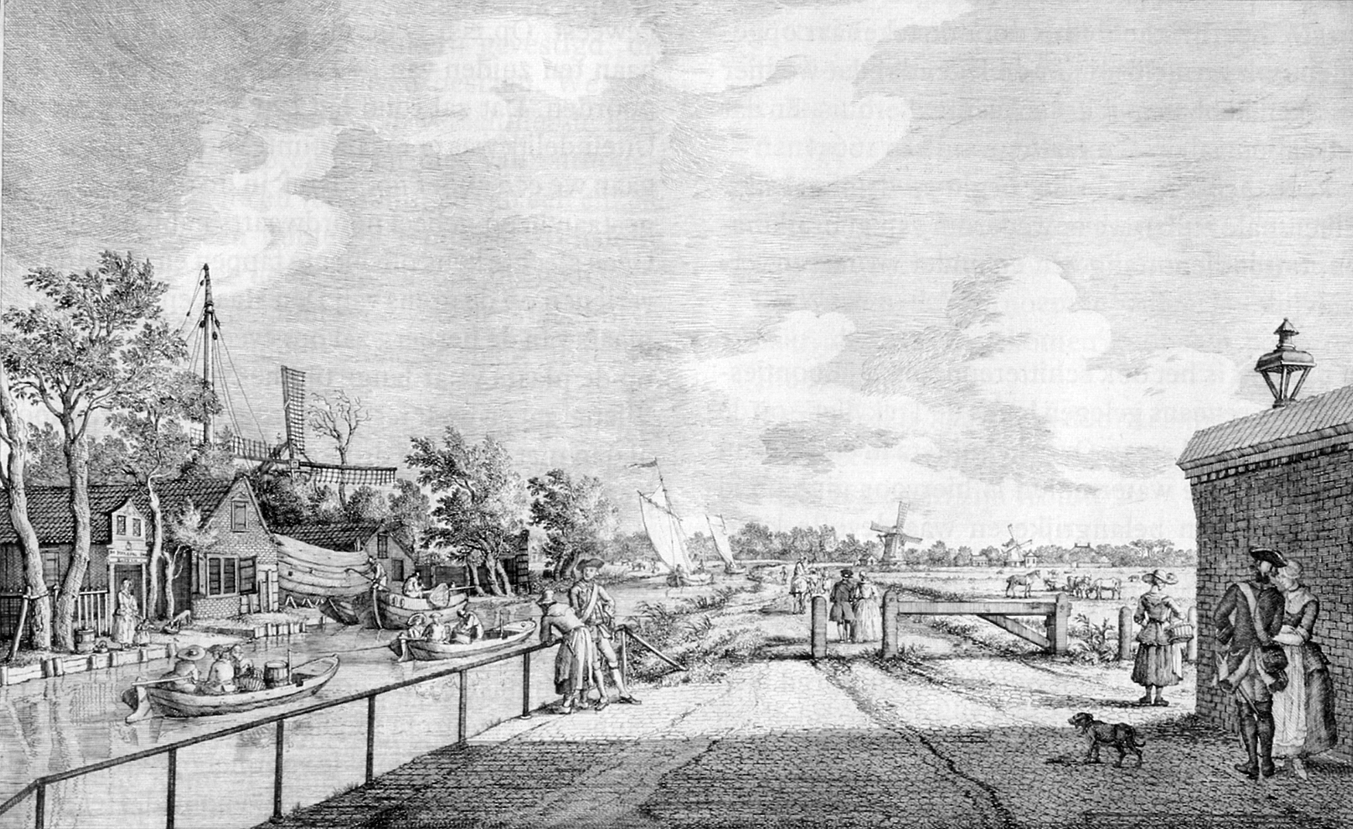 Hamlet 't Sluijsje in the vicinity of Rijswijk